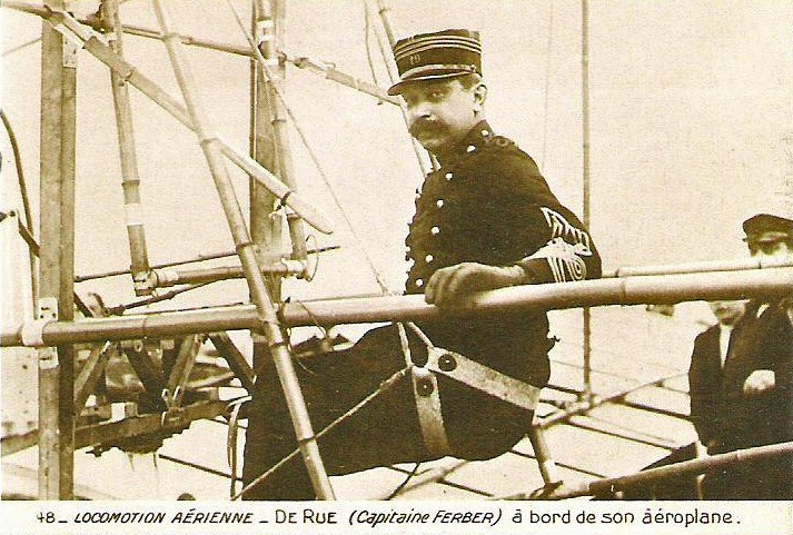 Locomotion Aérienne - De Rue (Capitaine Ferber) à bord de son àéroplaneAvece la N°17 de Rue capt Ferber lors de la Grande Semaine d'Aviation de la Champagne .